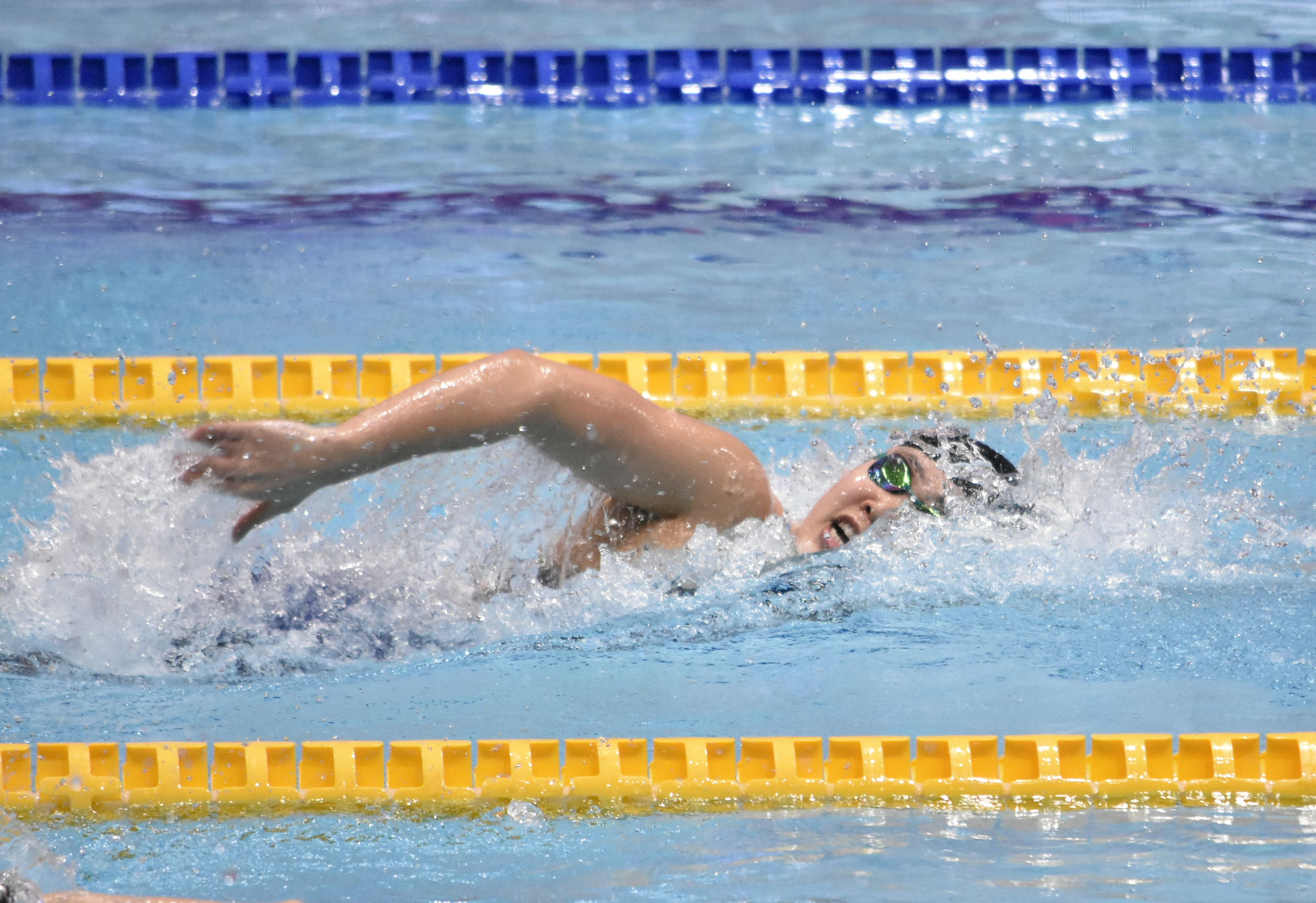 白井 璃緒